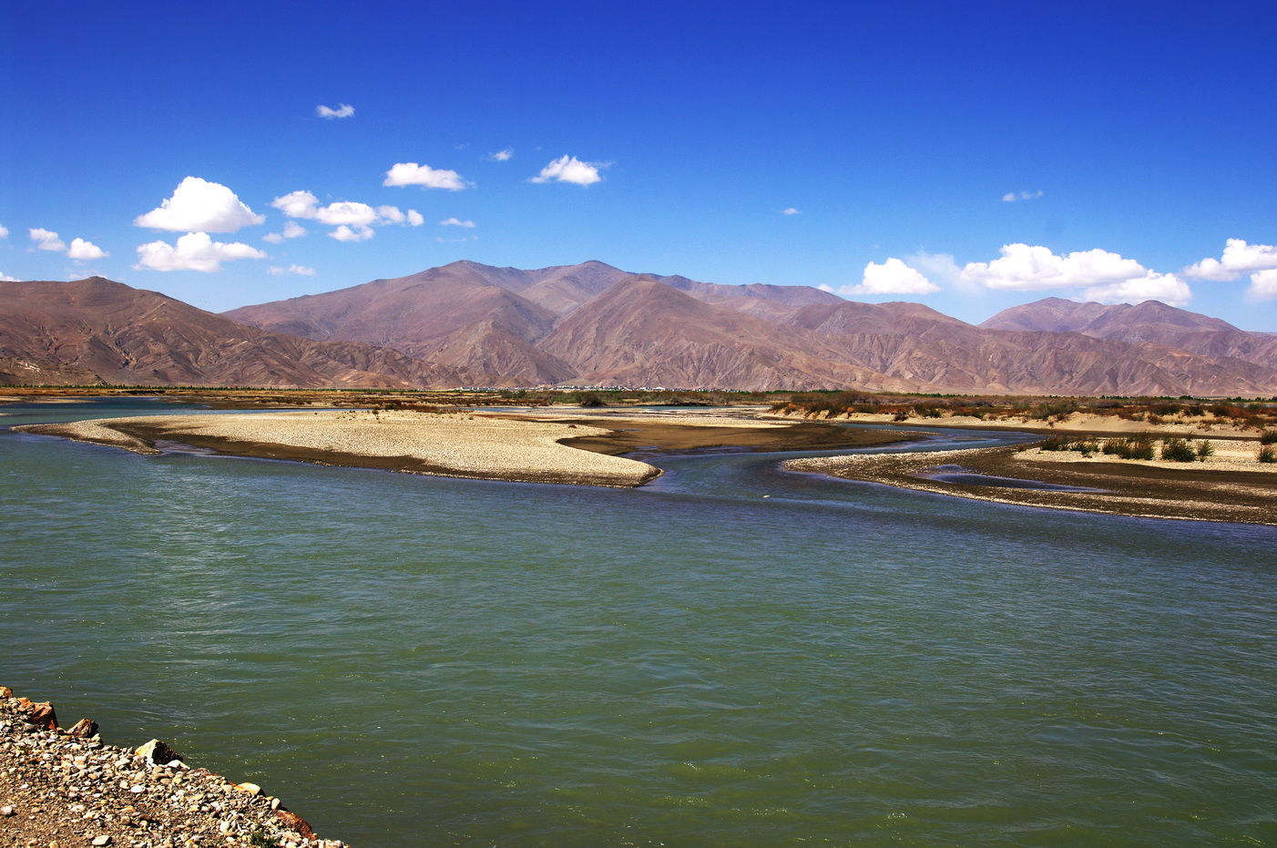 Yarlung Tsampo bei Lhatse